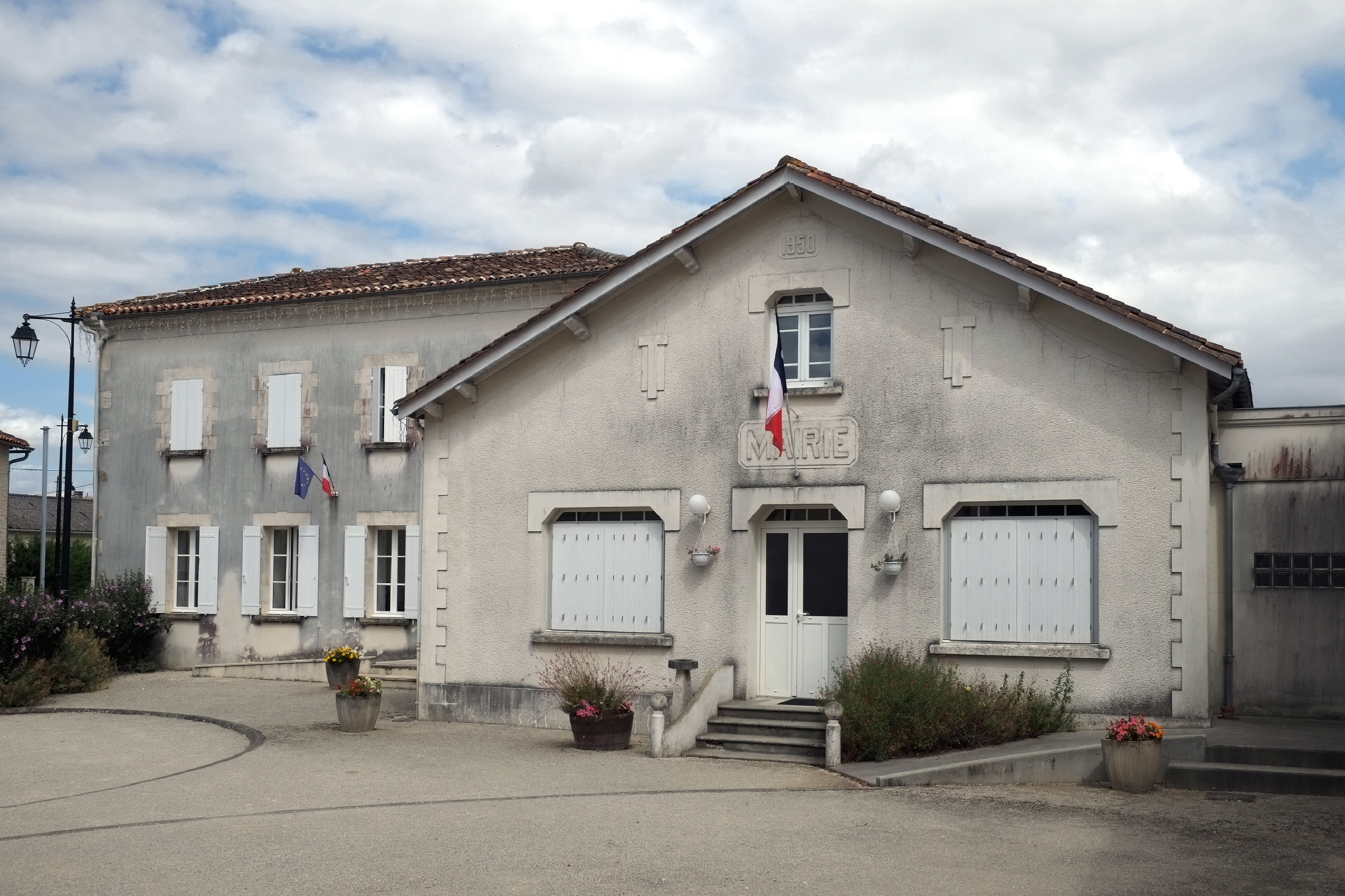 Mairie Cressé Charente-Maritime France